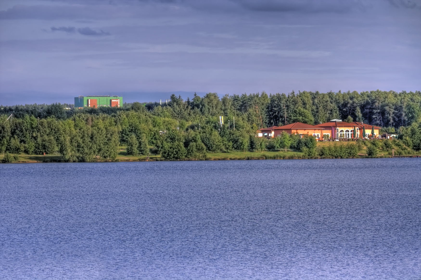 Murner See mit Freizeitanlage (Vordergrund) und Innovationspark Wackersdorf im Hintergrund (ehemalige WAA Wackersdorf)